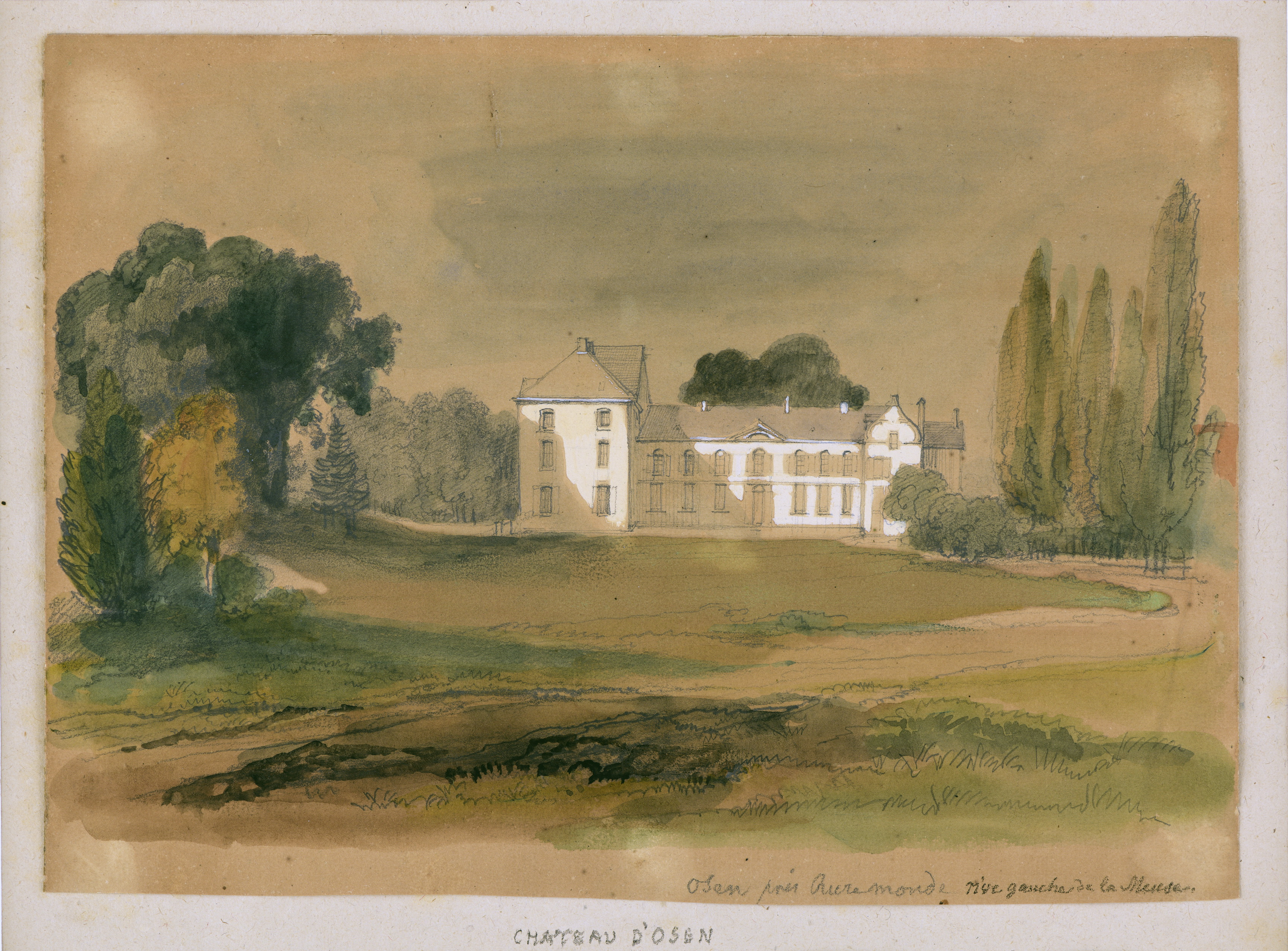 Kasteel Osen tussen Heel en Linne bij Roermond, gesloopt in 1894. Aquarel door Théodore Schaepkens. Afmetingen: 33 x 41 cm. Collectie Bonnefantenmuseum, Maastricht, inv.nr. 1001962 (aankoop 1973).